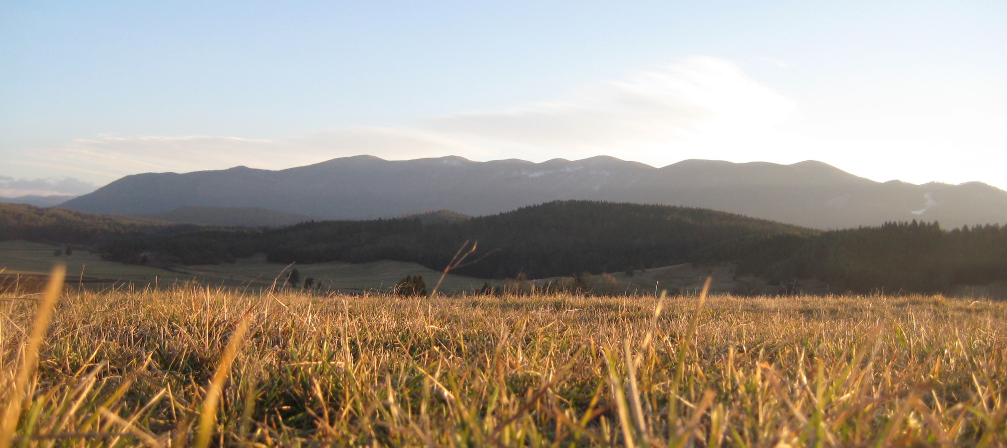 Javorniki, mountain range in Slovenia